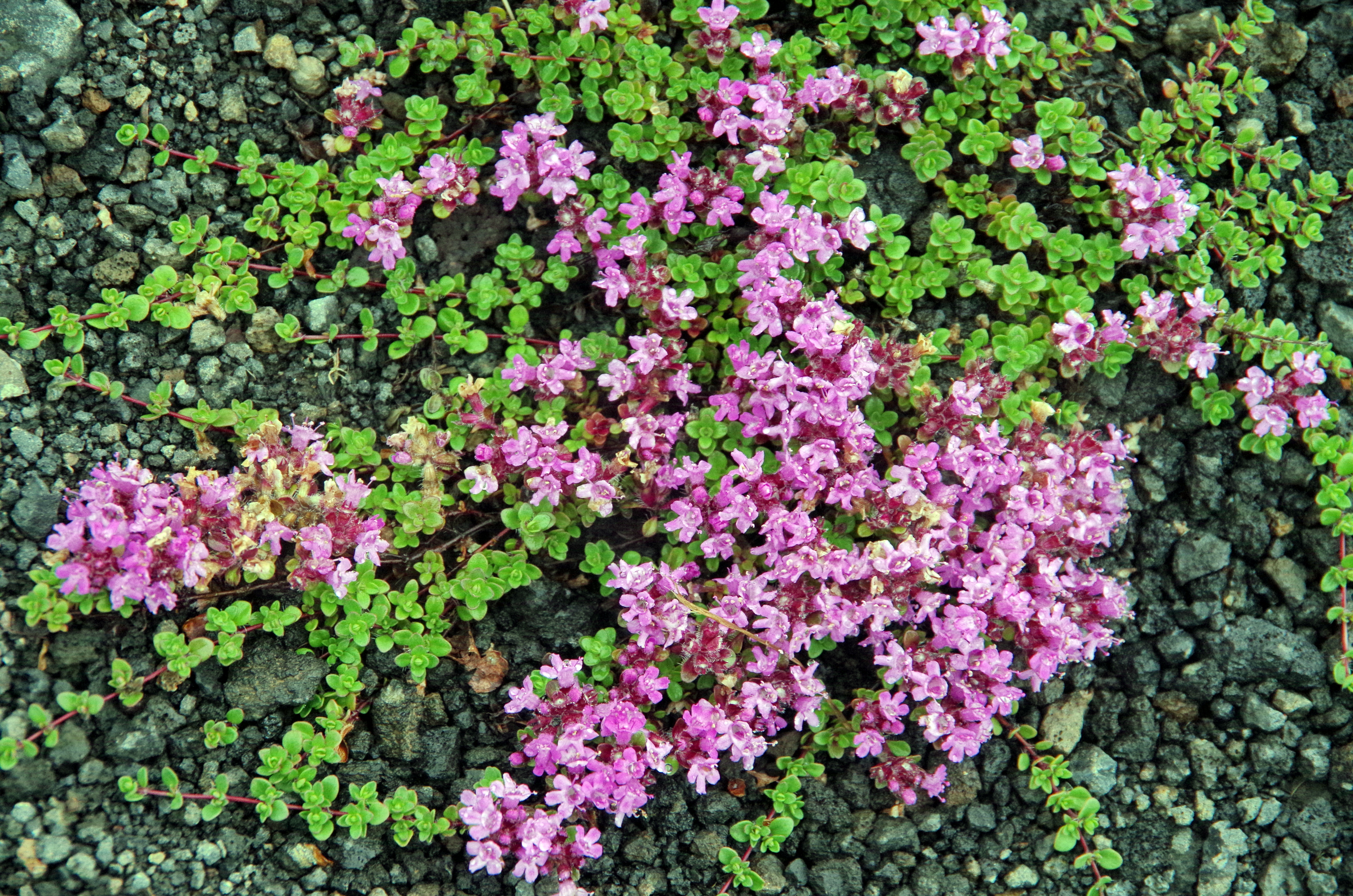 Pflanzen auf dem Lavafeld von Dimmuborgir